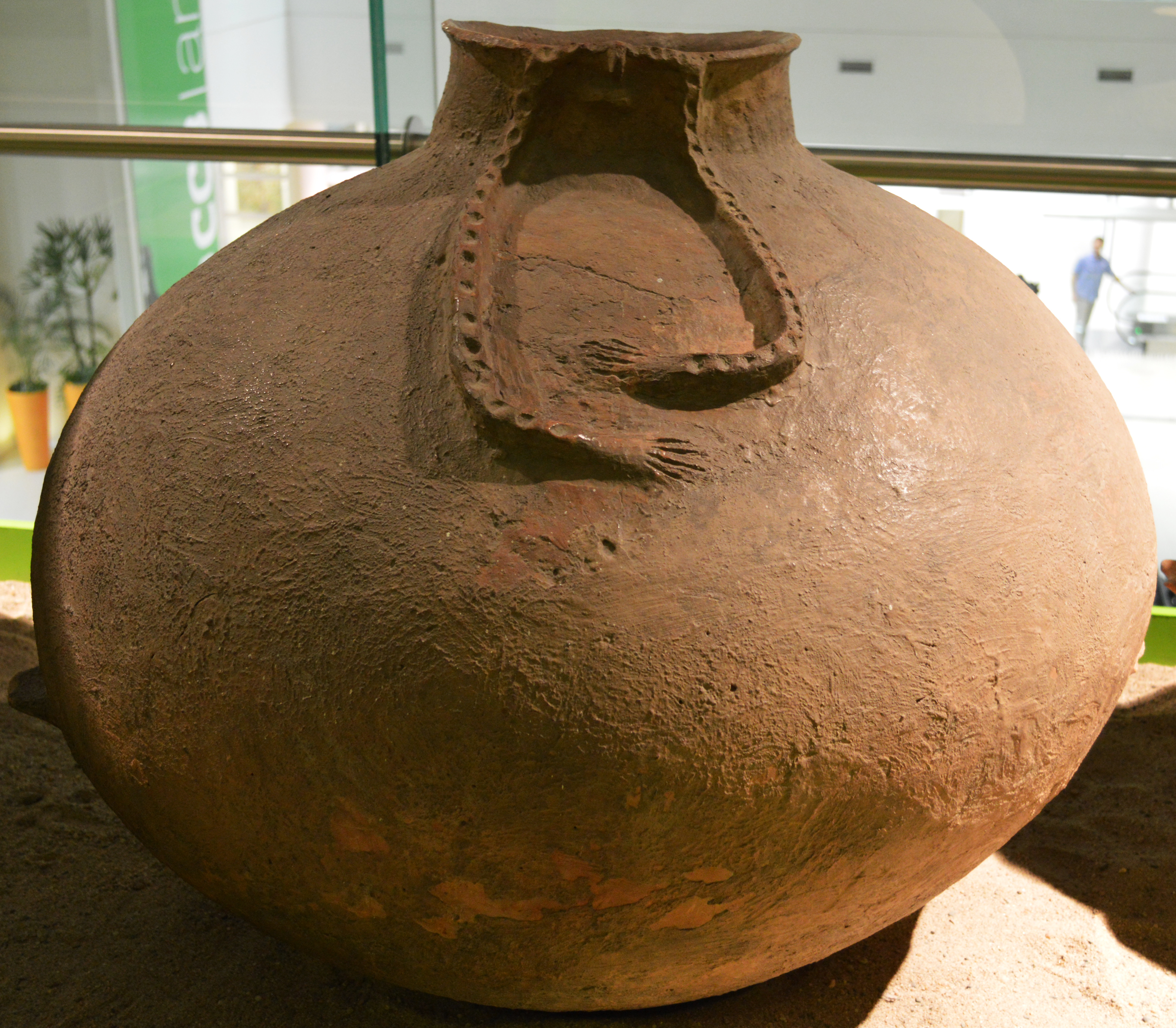 Museo Histórico Di Lullo